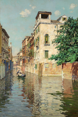 Canale veneziano, olio su tela, cm. 75,5 x 51,5, firmato, coll. privata